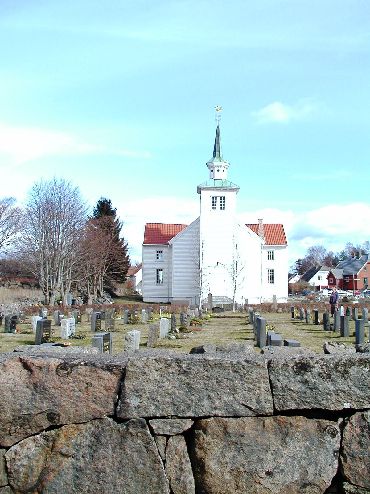 Kirche in Spangereid (Norwegen); selbst aufgenommen 2006 durch Kantor.JH.